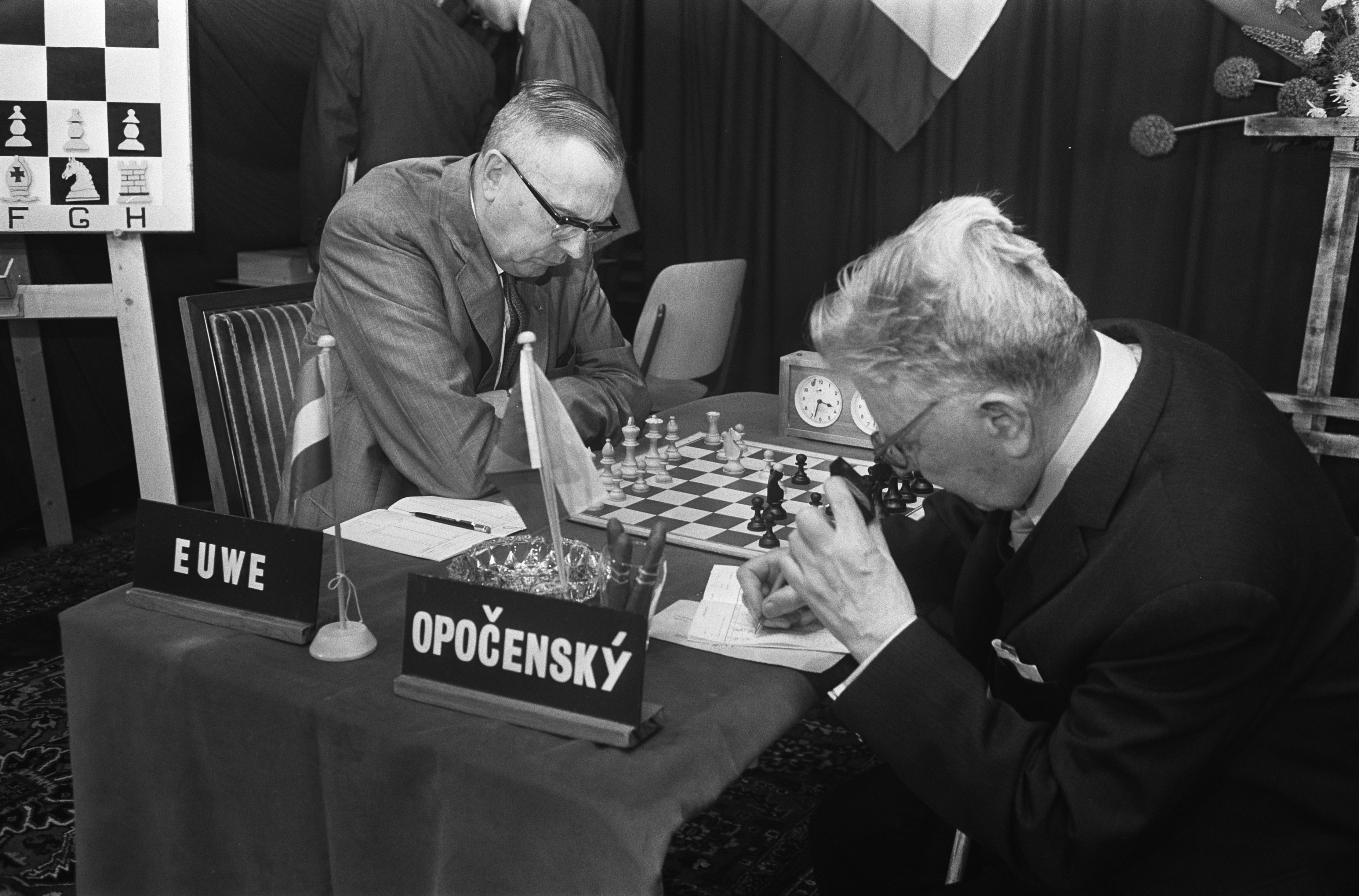 Collectie / Archief : Fotocollectie Anefo Reportage / Serie : Internationale Schaakvierkamp te Bladel ter herdenking aan de 40 jaar geleden overleden Hongaarse grootmeester Richard Reti Beschrijving : Réti Herdenkingstoernooi: internationale schaakvierkamp. Euwe tegen Opocenský Annotatie : randnummers negatiefstrook: 15: Flohr tegen Müller randnummers negatiefstrook: 16, 17: Euwe tegen Opocenský Datum : 3 juli 1969 Locatie : Bladel, Noord-Brabant Trefwoorden : denksporten, schaken Persoonsnaam : Euwe, Max, Opocenský, Karel Fotograaf : Fotograaf Onbekend / Anefo, [onbekend] Auteursrechthebbende : Nationaal Archief Materiaalsoort : Negatief (zwart/wit) Nummer archiefinventaris : bekijk toegang 2.24.01.05 Bestanddeelnummer : 922-5950